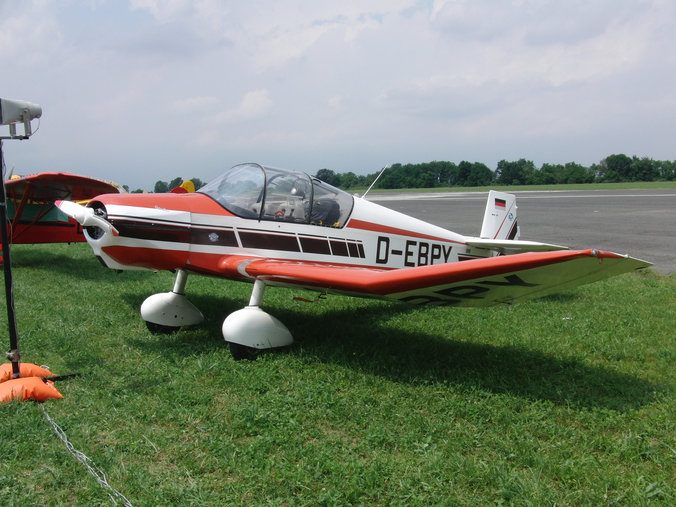 Wassmer Model D-120 in mostra statica al Centenario Aeroporto TorinoAeritalia 2016 - Historical Aircraft Group